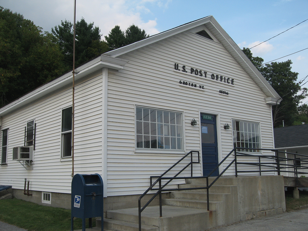 Groton, Vermont